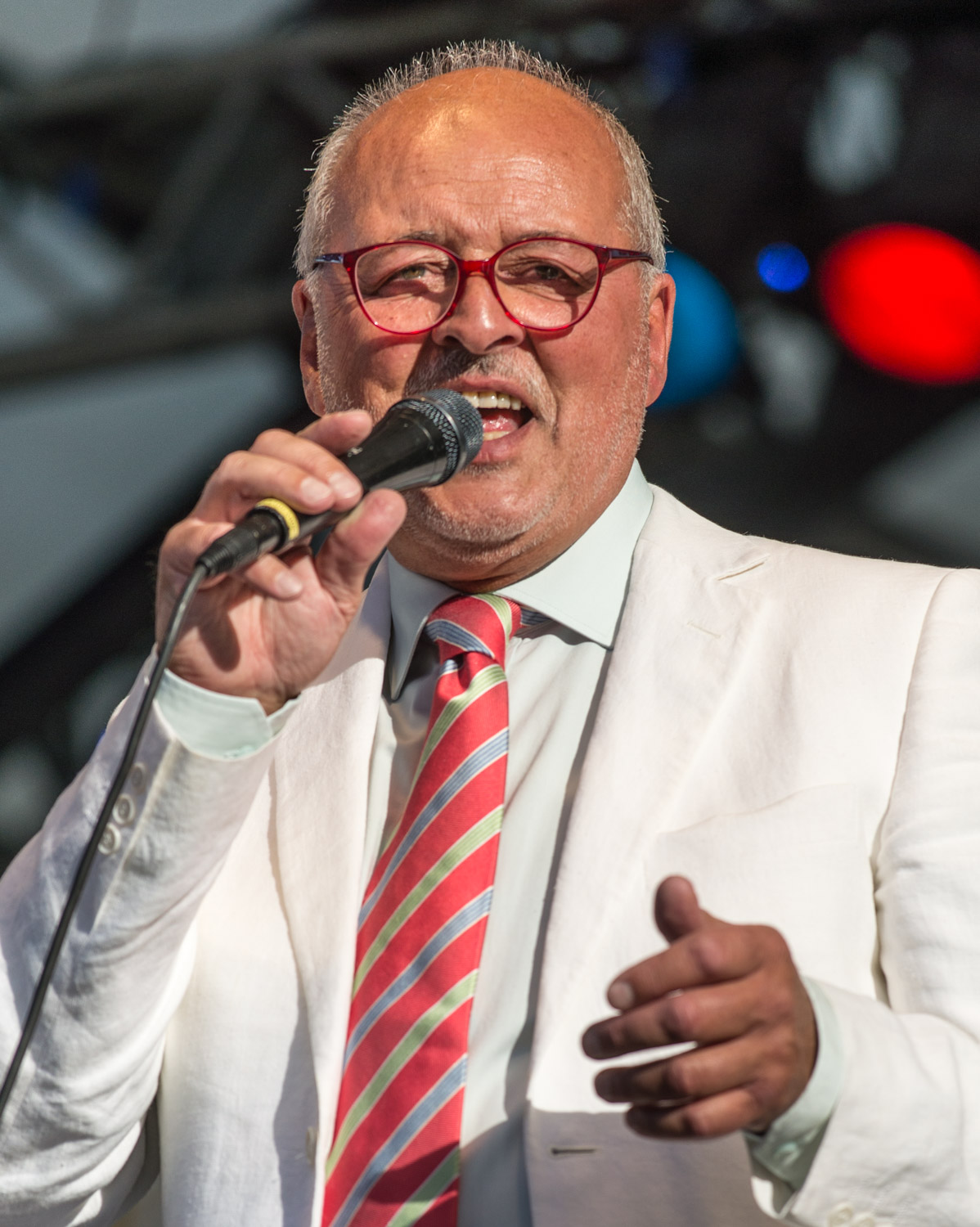 Bosse Andersson med Ballroom Big Band i Kungsträdgården i Stockholm den 22 juli 2015.